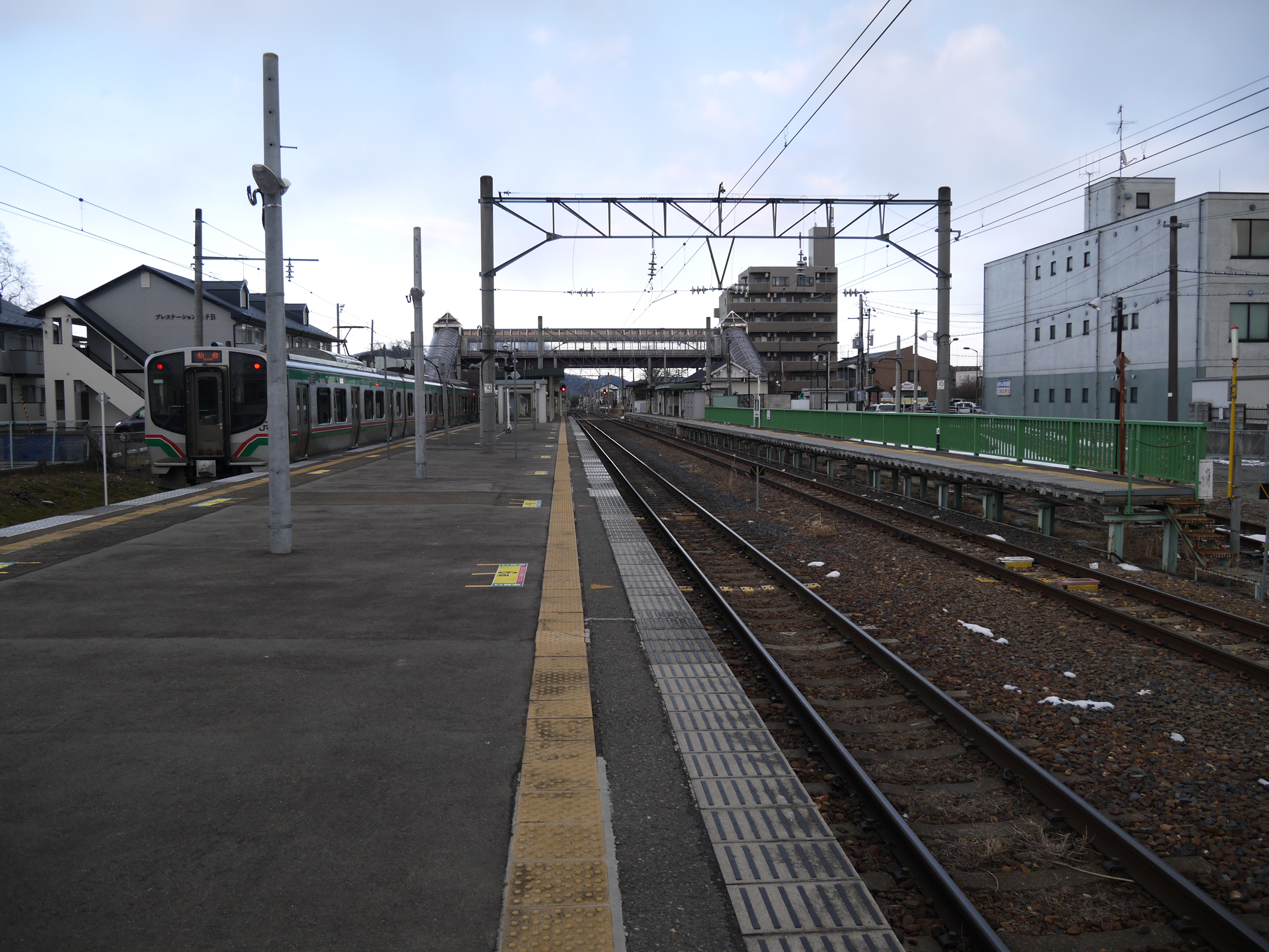 JR愛子駅 ホーム